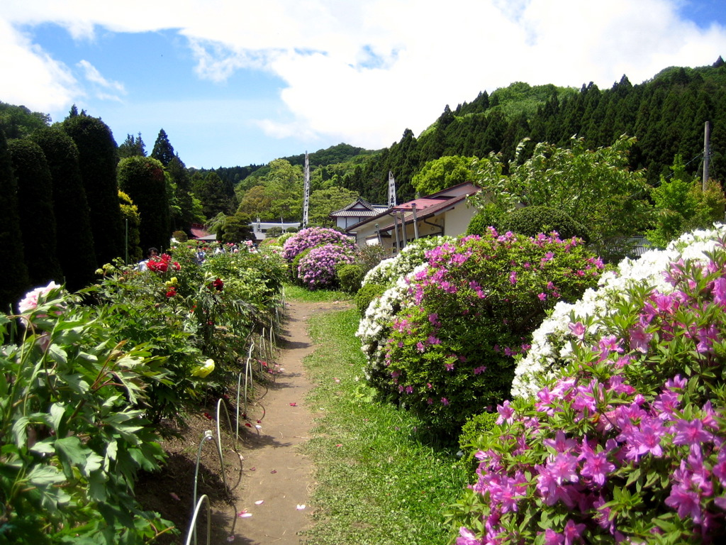 Botan (Peony) garden in Kanahebisui Shrine